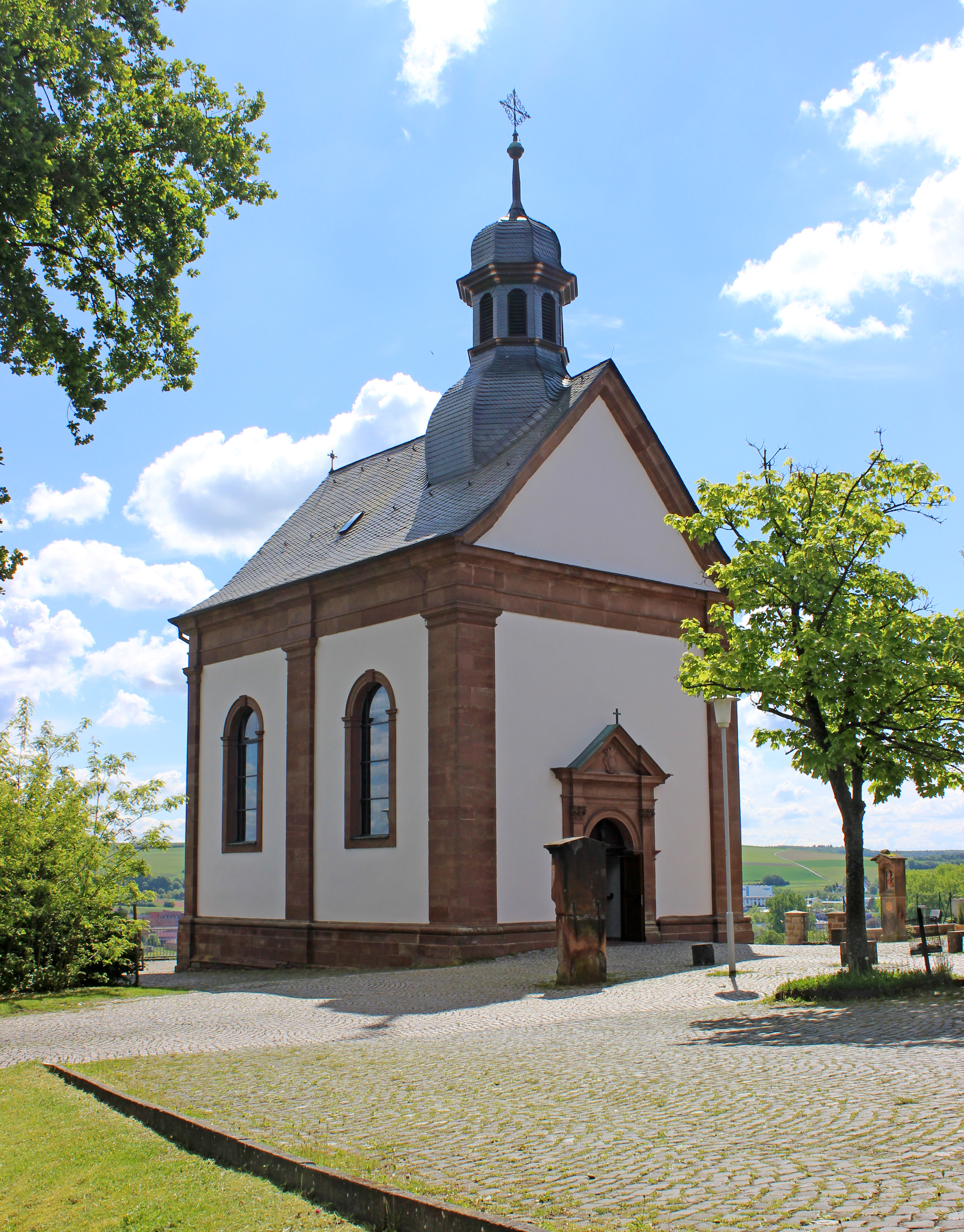 Die Heilig-Kreuz-Kapelle in Blieskastel, Saarpfalz-Kreis, Saarland.